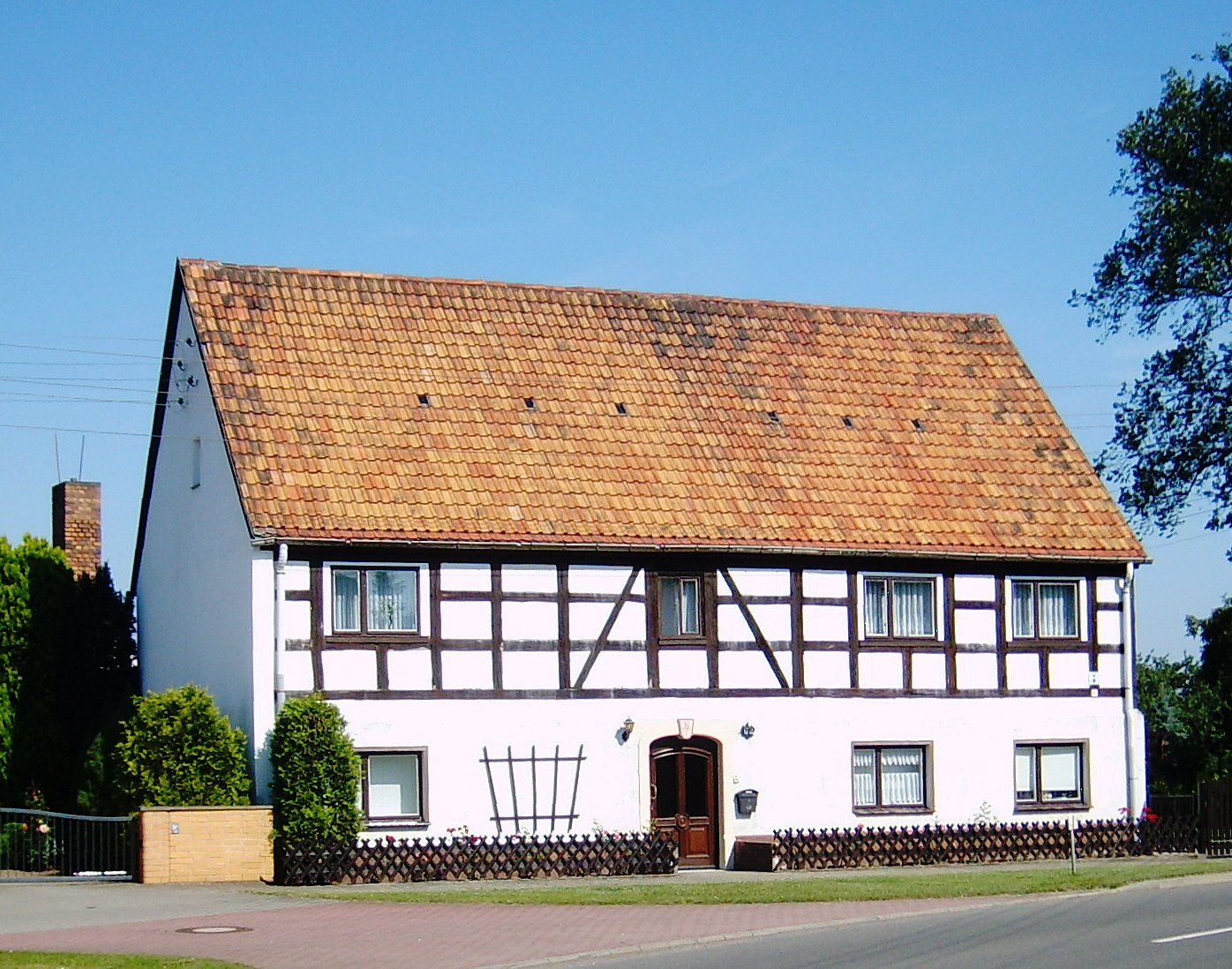 Bad Liebenwerda-Baudenkmal im Ortsteil Prieschka